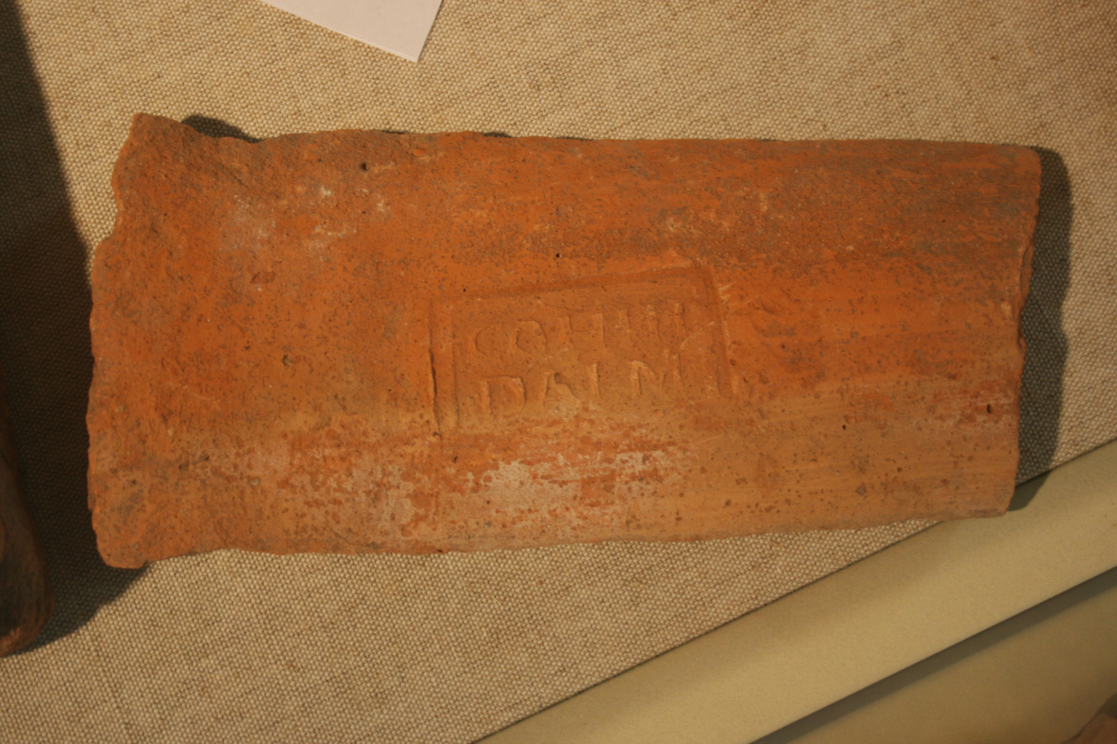 Ziegelstempel der Coh. III Dalmatarum aus dem Kastell Rückingen in Erlensee. Ausstellung im Heimatmuseum in der Rückinger Wasserburg.